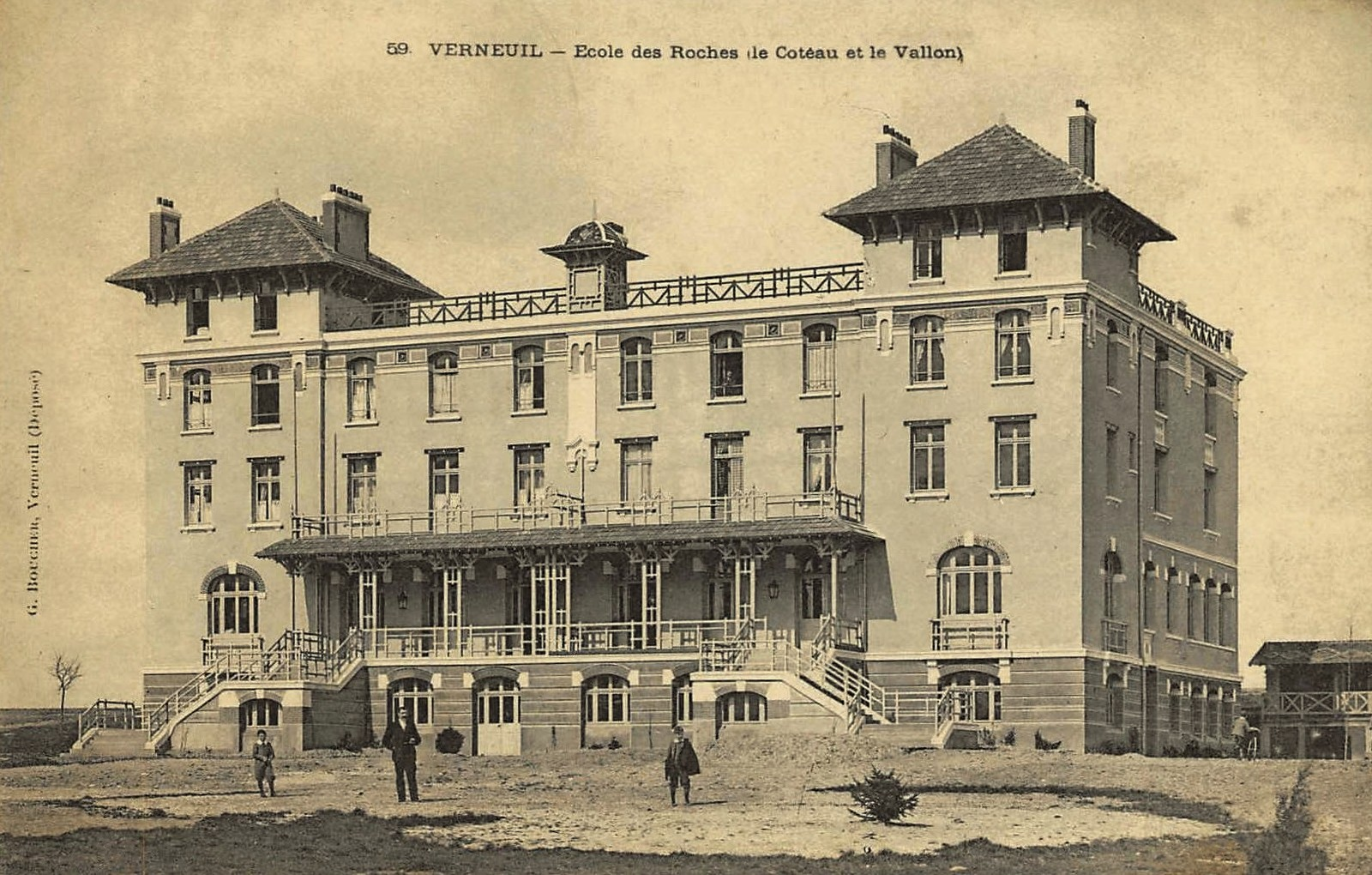 Ancien château abritant l'école des Roches à Verneuil-sur-Avre (Eure). Carte postale vers 1910.